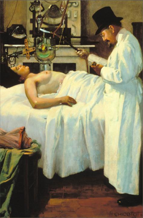 Œuvre de Georges Chicotot (1868-1921) concernant l'un des premiers essais du traitement du cancer par les rayons X.